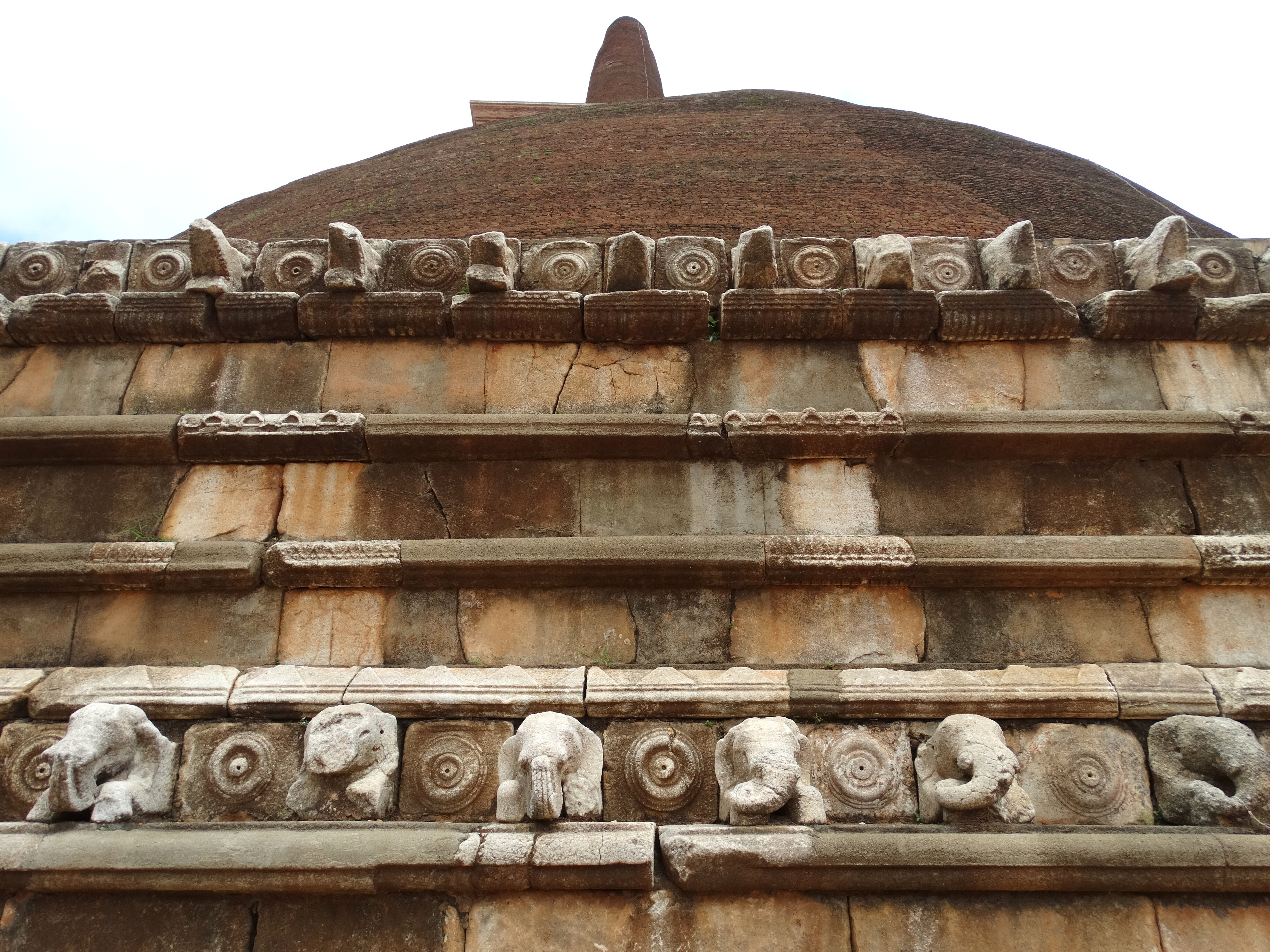 Detail of Abhayairi Dagoba - Anuradhapura - Sri Lanka